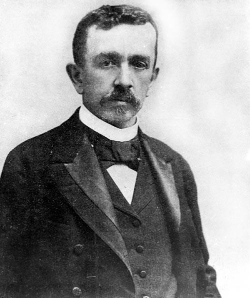 President Federico Errazuriz Echaurren